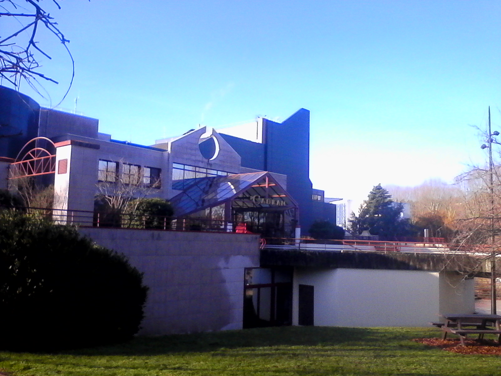 Salle de concert inauguré en 1991 servent aussi pour les congre est les spectacle à Evreux